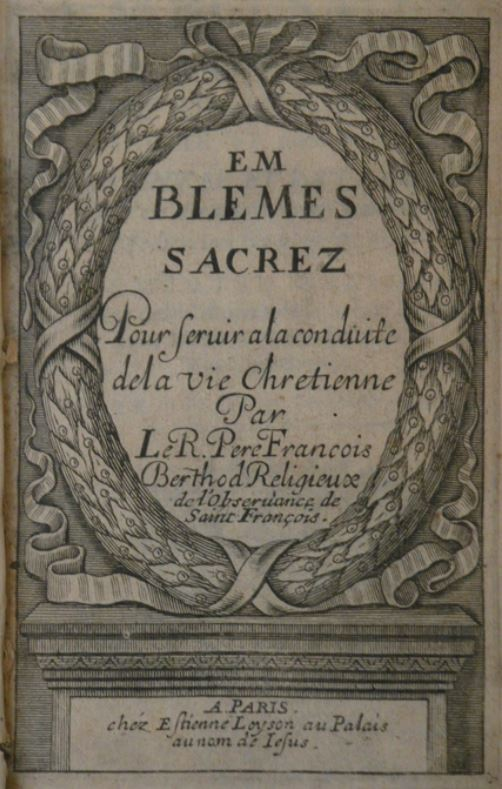 Title page of Berthod's Emblesmes sacrez (Paris, 1665)